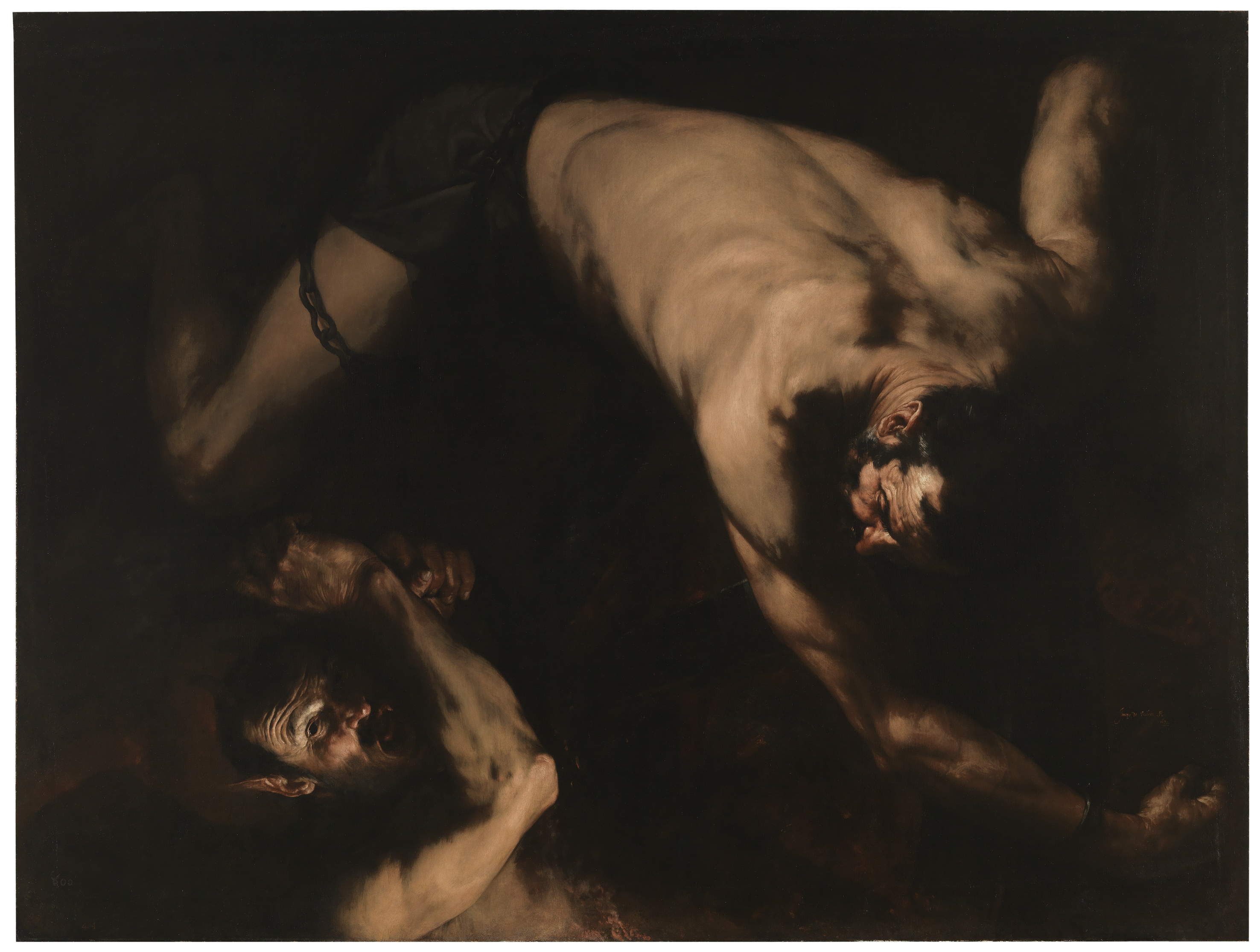 José Ribera, Ixion (1632). Oil on canvas, 220 x 301 cm. Museo del Prado, Madrid.